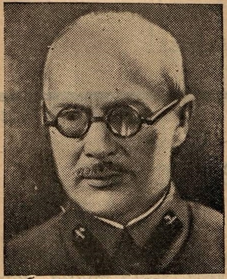 Артур Фердинандович Лолейт (5 июня 1868[1], Орёл — 4 июня 1933, Москва) — российский инженер, архитектор, изобретатель и преподаватель.